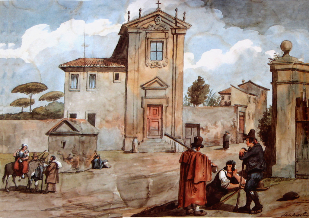 Chiesa del Domine Quo Vadis